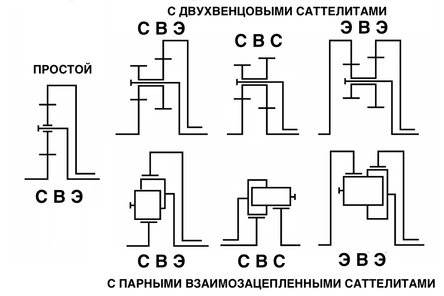 Схемы семи простых планетарных механизмов